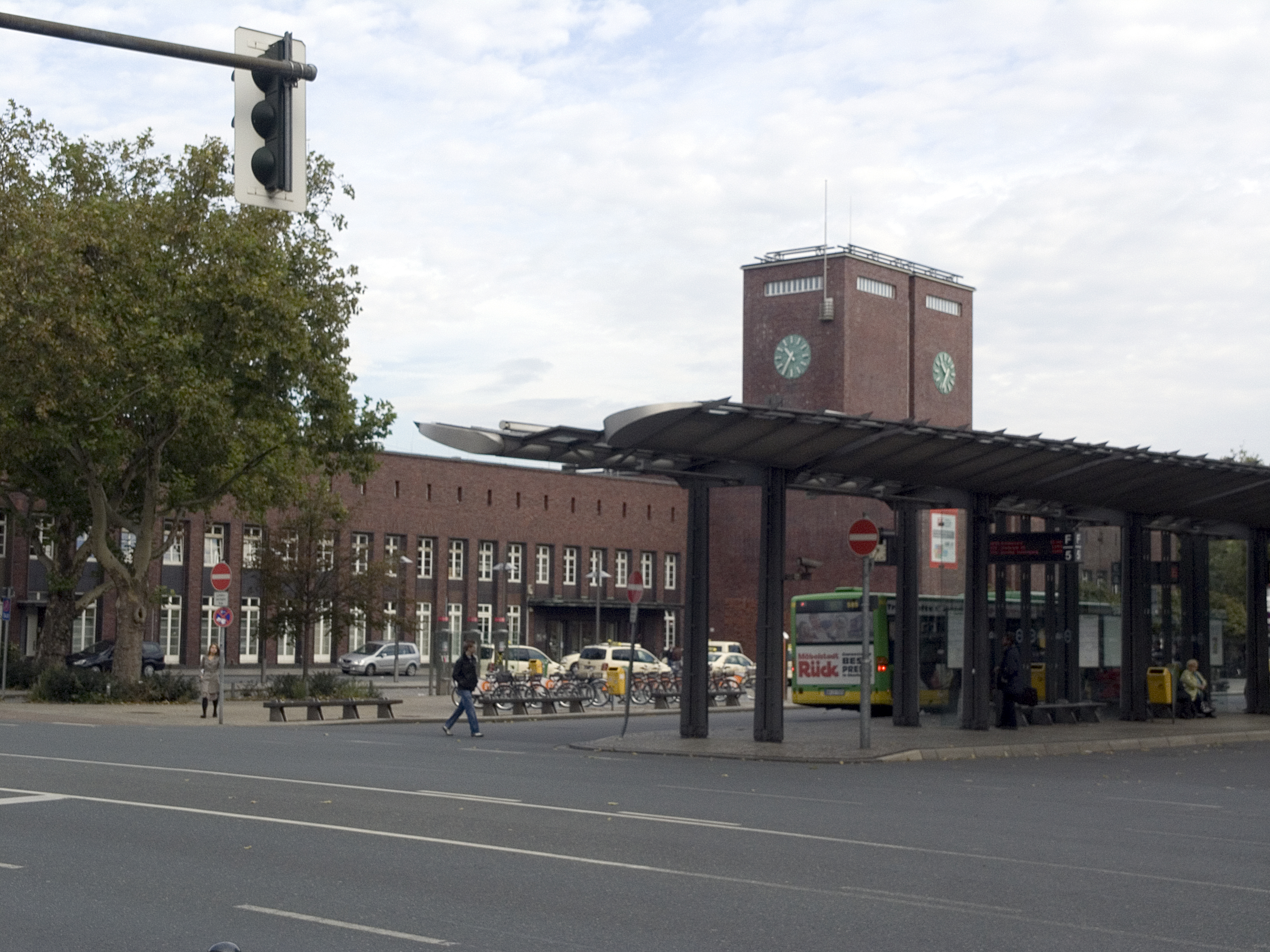 Северный Рейн - Вестфалия, Оберхаузен - Здание Центрального вокзала